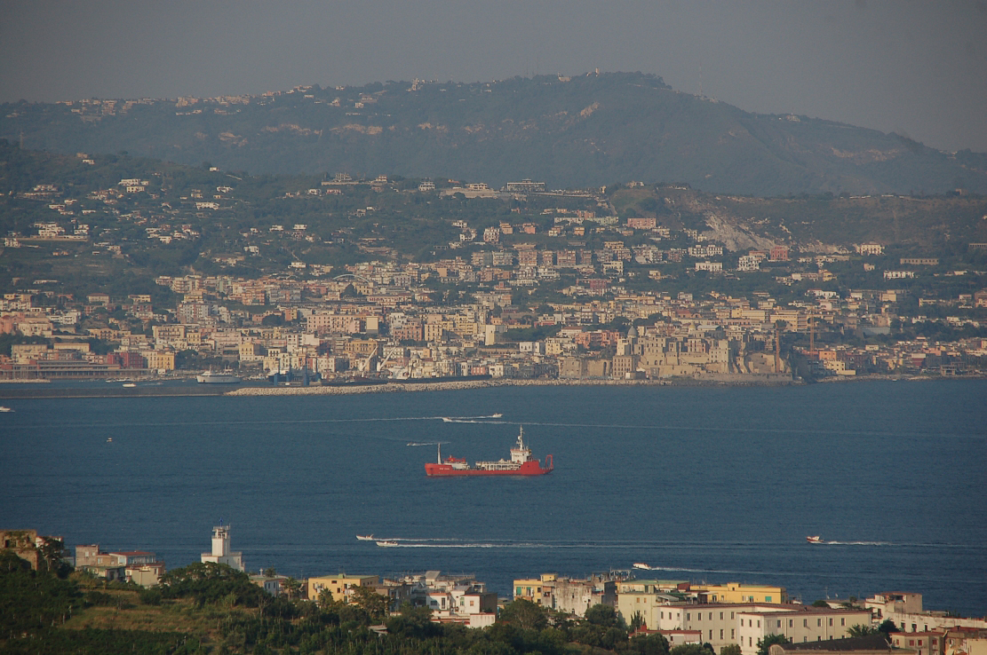 Campi Flegrei (Provinz Neapel). Pozzuoli von Bacoli aus gesehen.